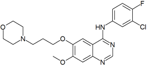 Gefitinib molecule